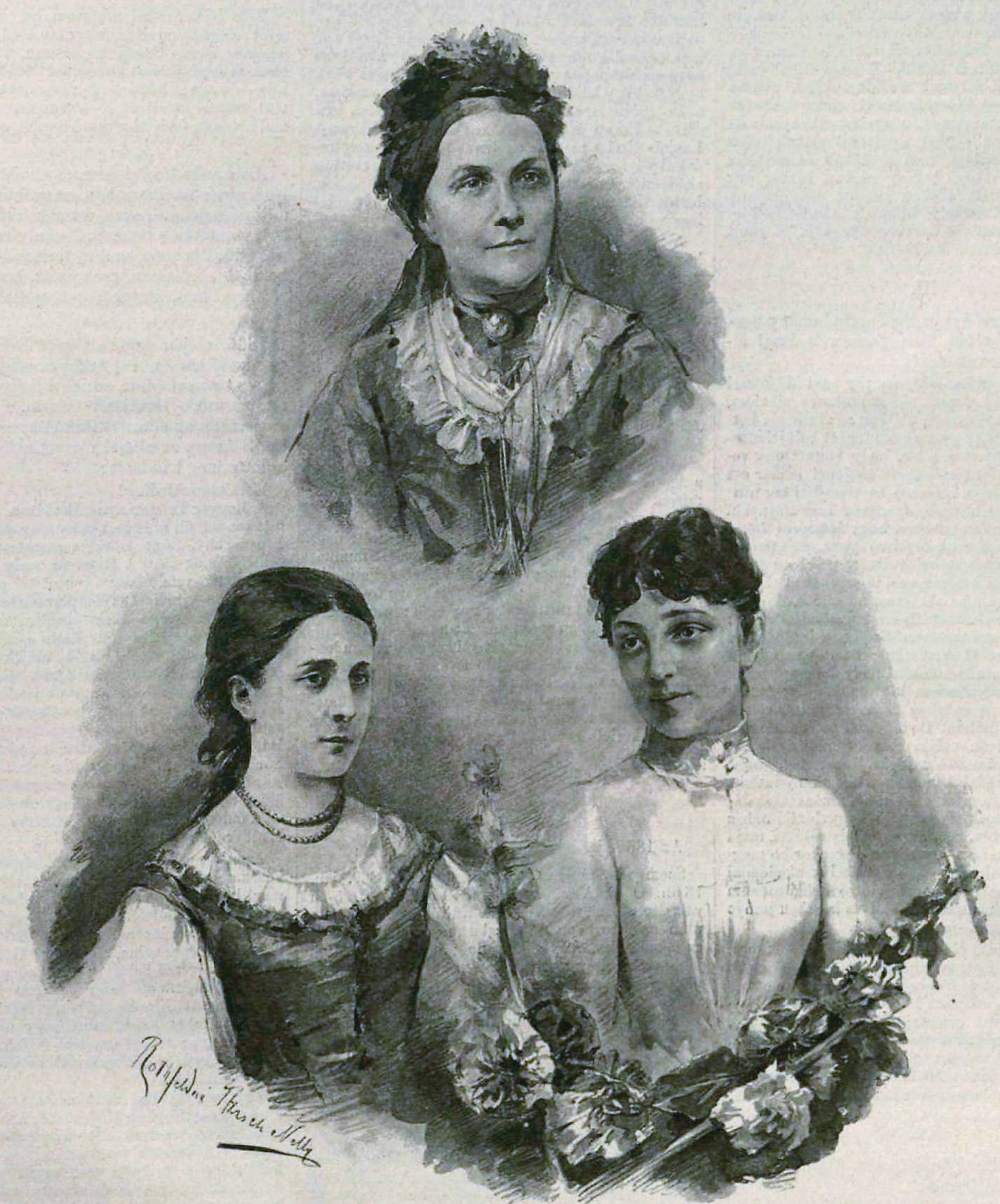 Vasárnapi Ujság illusztrációja. "ARANY JÁNOS LEÁNYA, JULISKA, SZÉLL KÁLMÁNNÉ. ARANY JÁNOSNÉ. UNOKÁJA, SZÉLL PIROSKA. Fennmaradt fényképeik után rajzolta R. Hirsch Nelli."